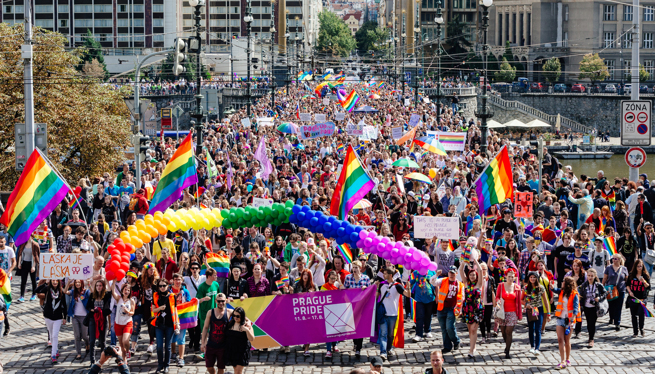 Prague Pride 2014, průvod na Čechově mostu